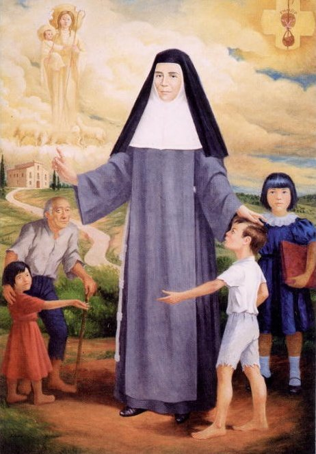 Lienzo encargado por las Franciscanas Misioneras de la Madre del Divino Pastor con motivo de la Beatificación de María Ana Mogas en Roma por Su Santidad Juan pablo II el 6 de octubre de 1996.